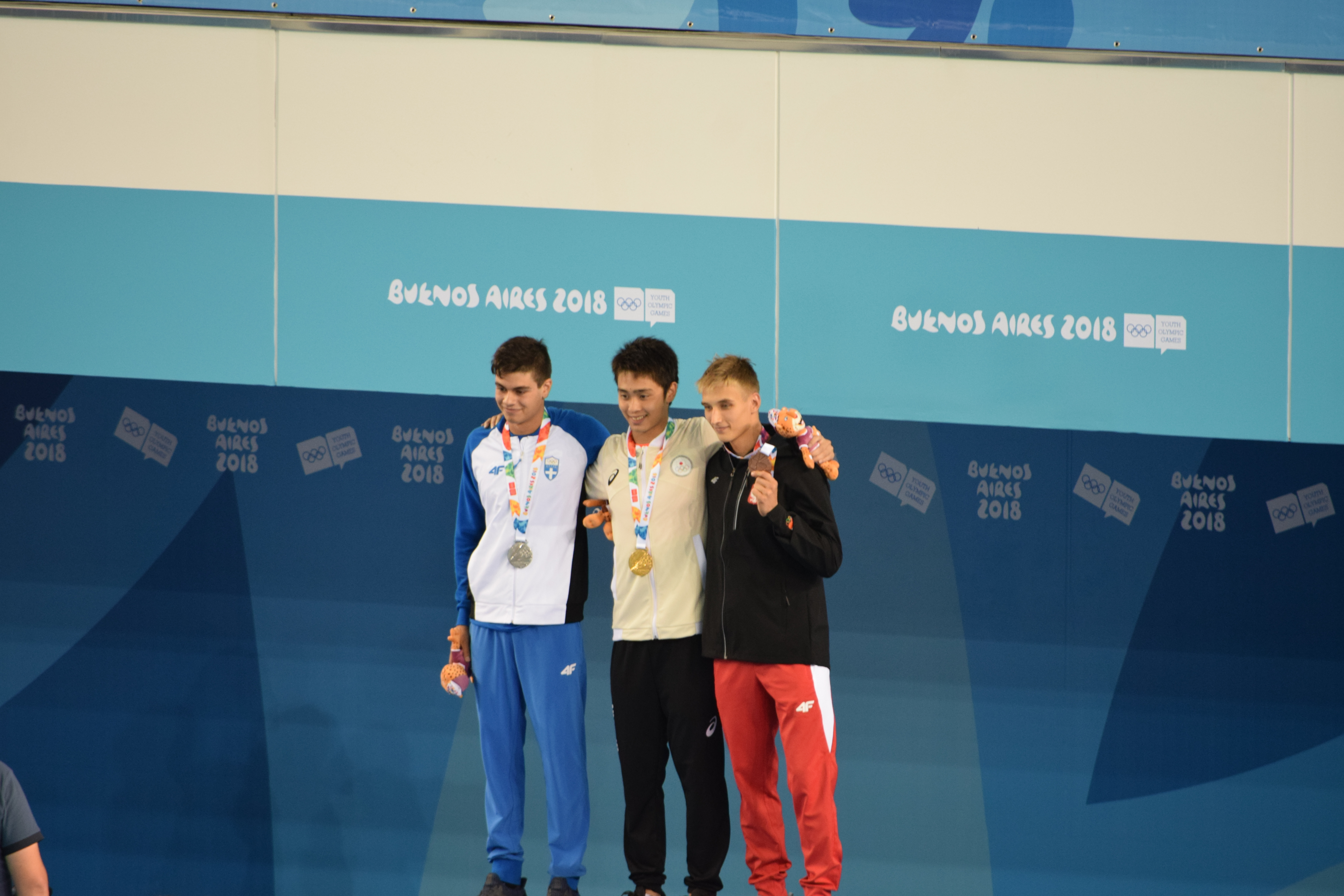 Finales de natación , durante los Juegos Olímpicos de la Juventud 2018 en Buenos Aires. Tarde del 10 de octubre.